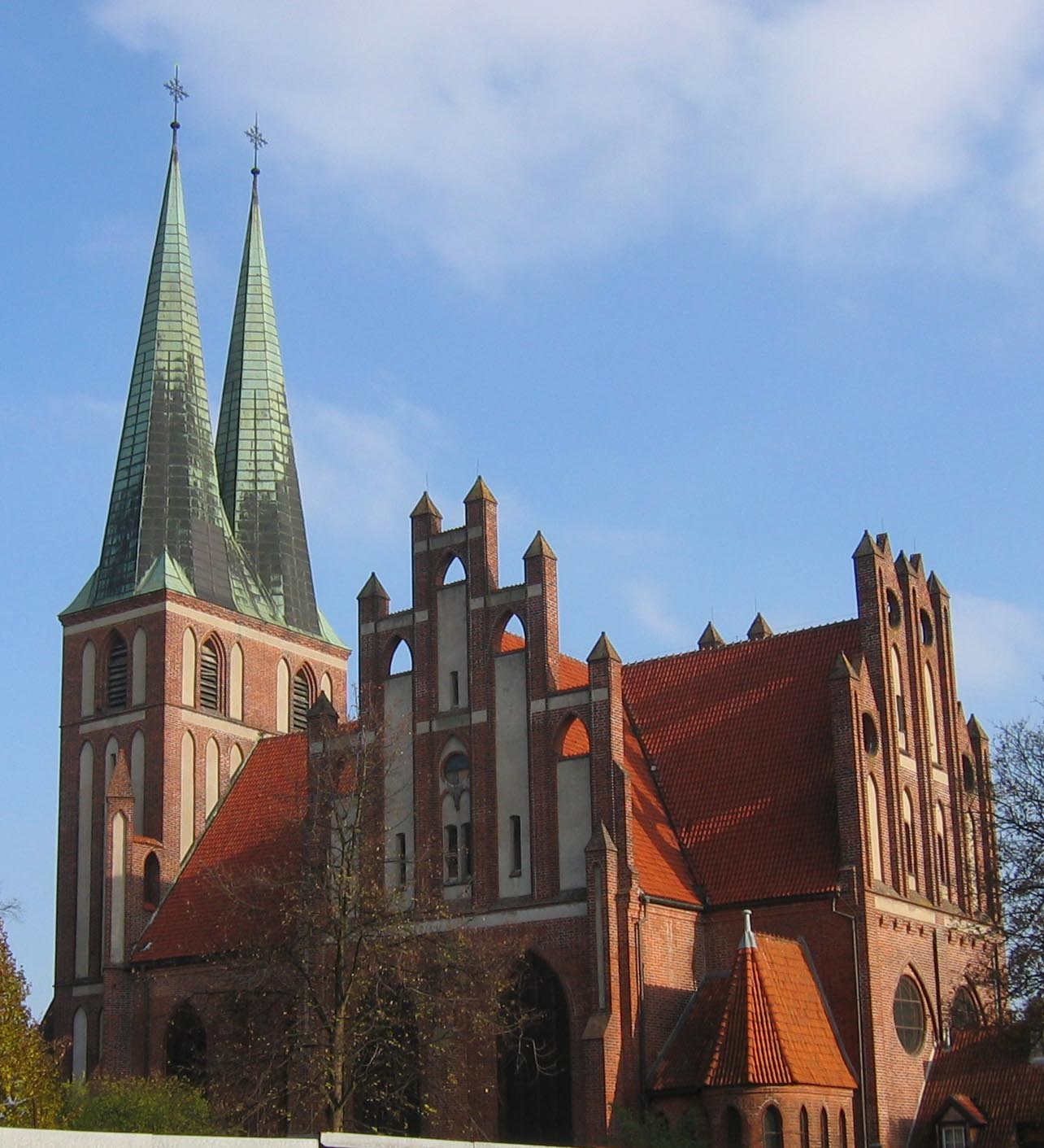 Olsztyn - kościół garnizonowy. Data: 27.10.2007